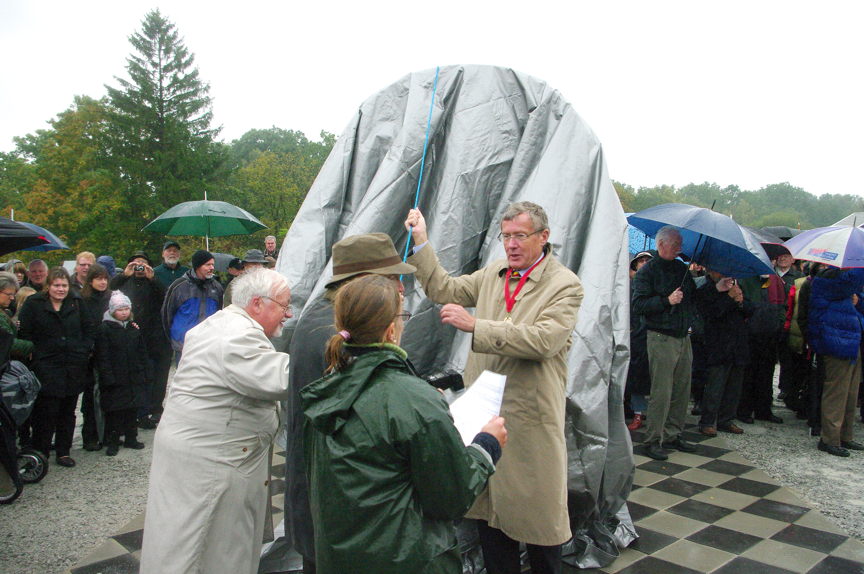 Invigning av konstverket Mittelen i Höör, Sweden 2009.